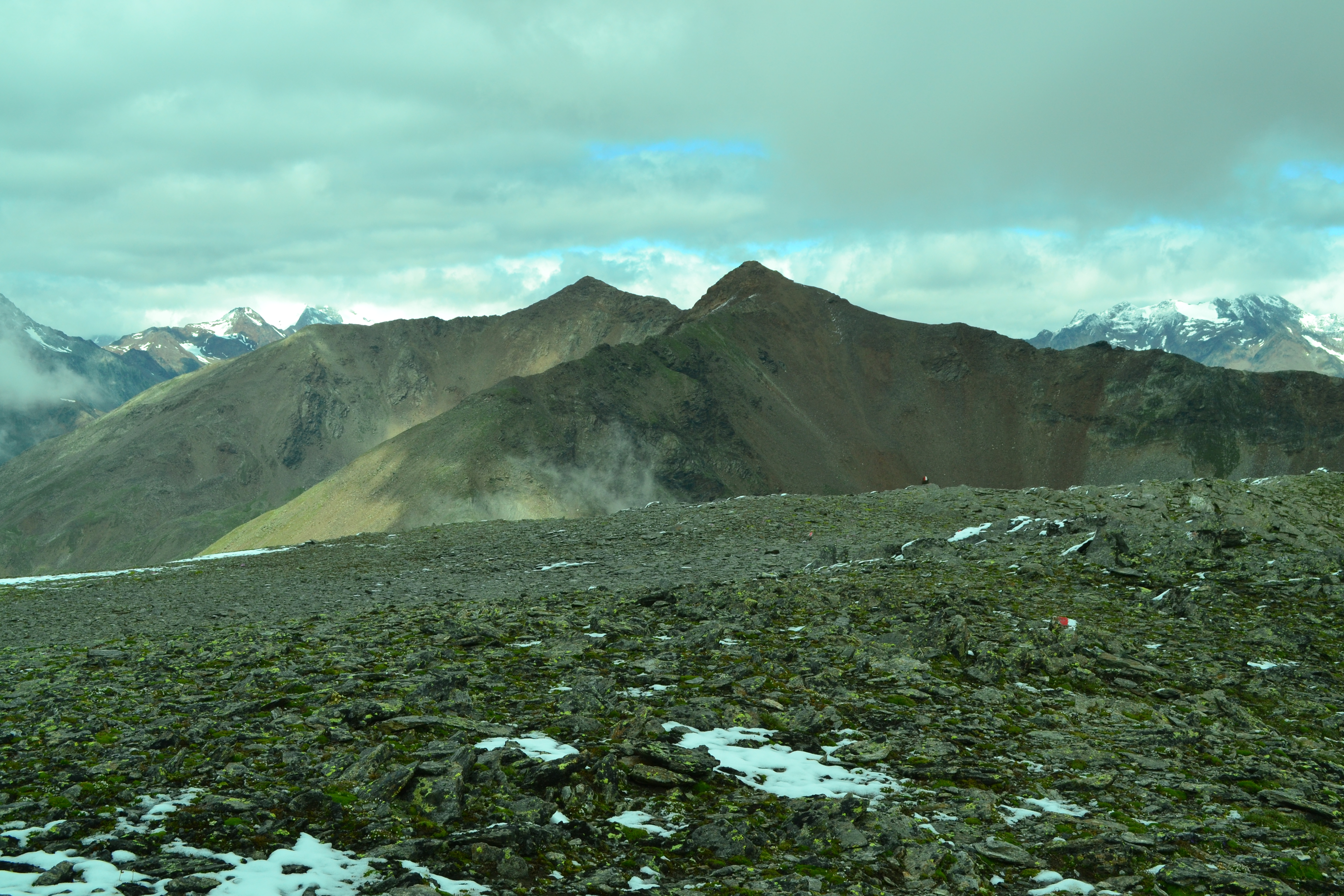 Mastaun Spitze (3200 m, links) und Malander (3174 m, rechts) von Süden vom Vorgipfel der Zerminiger Spitze (P. 3059)